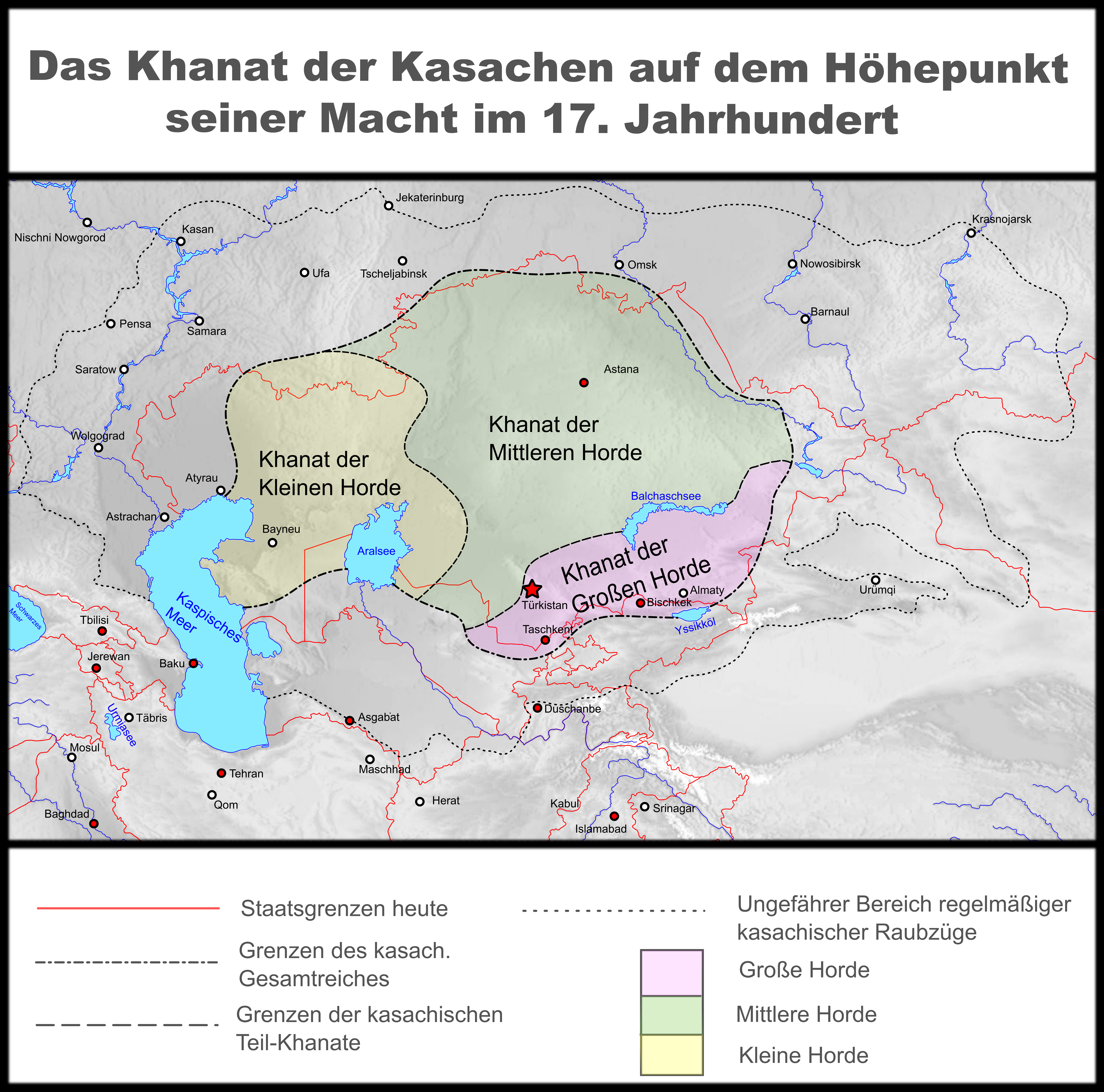 Darstellungskarte des Kasachen-Khanates und seiner Apanagen (Teilherrschaften): Gelb = Kleine Horde, Grün = Mittlere Horde, Purpur = Große Horde. Obwohl sie turksprachig waren, führten sich die kasachischen Khane auf den Mongolenherrscher Dschingis Khan und dessen Erben zurück. Sie fühlten sich also als Dschingiskhaniden und so wird das Kasachen-Khanat vielfach als turk-mongolisches Nachfolgereich angesehen. Das Kasachen-Khanat war wie alle zentralasiatischen Steppenreiche nomadisch geprägt. So besaß es keine festen und klar definierte Grenzen. Dieses gilt auch für die Apanagen. So ist diese Darstellungskarte vielmehr als Momentaufnahme zu sehen. Das angegebene Gebiet zeigt nicht, wie oft vermutet, den Siedlungsraum der verschiedene Stämme und Clans, sondern vielmehr wird hier das Einflussgebiet der Horden dargestellt.